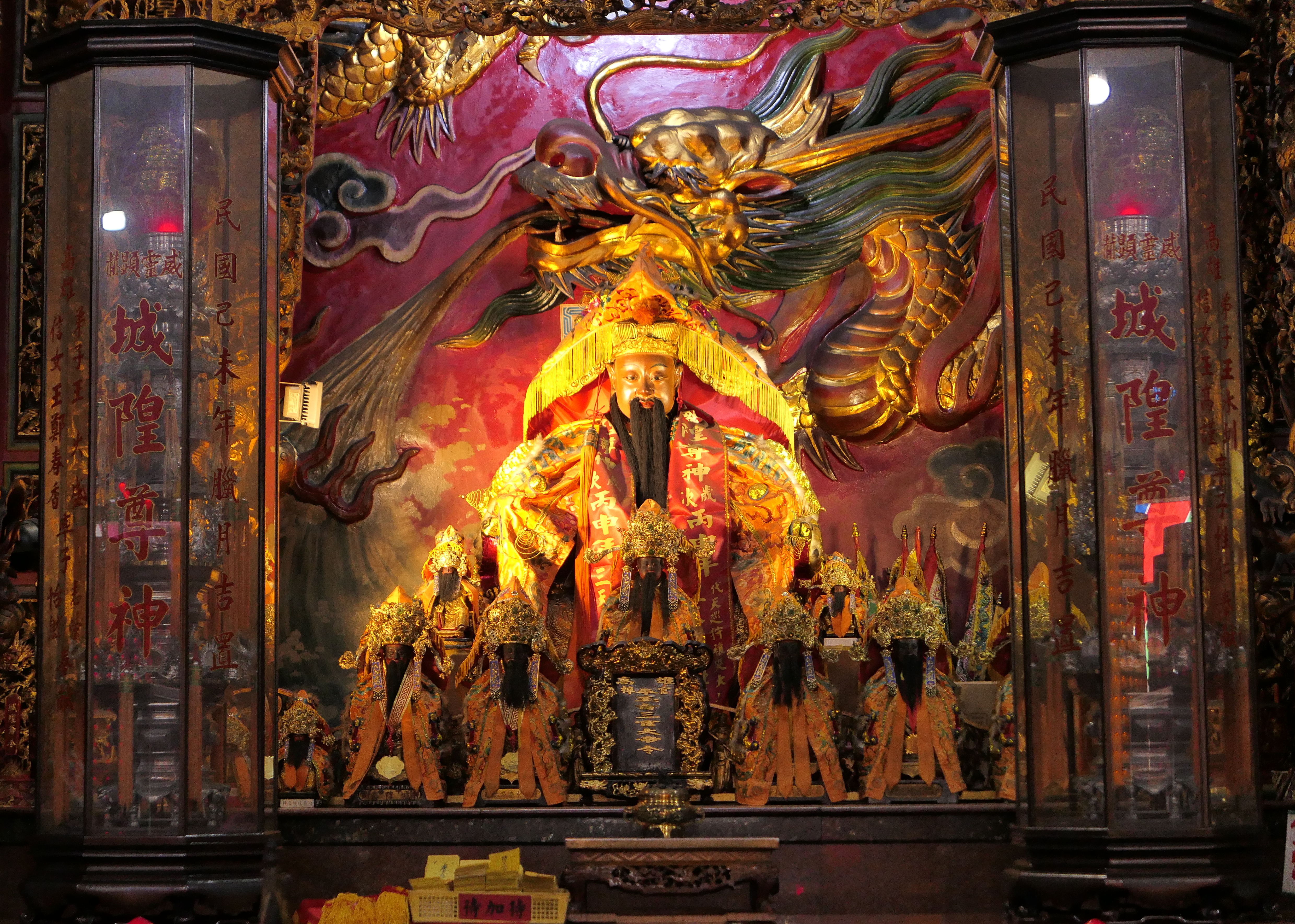 中文（台灣）: 梓官中崙城隍廟城隍神像